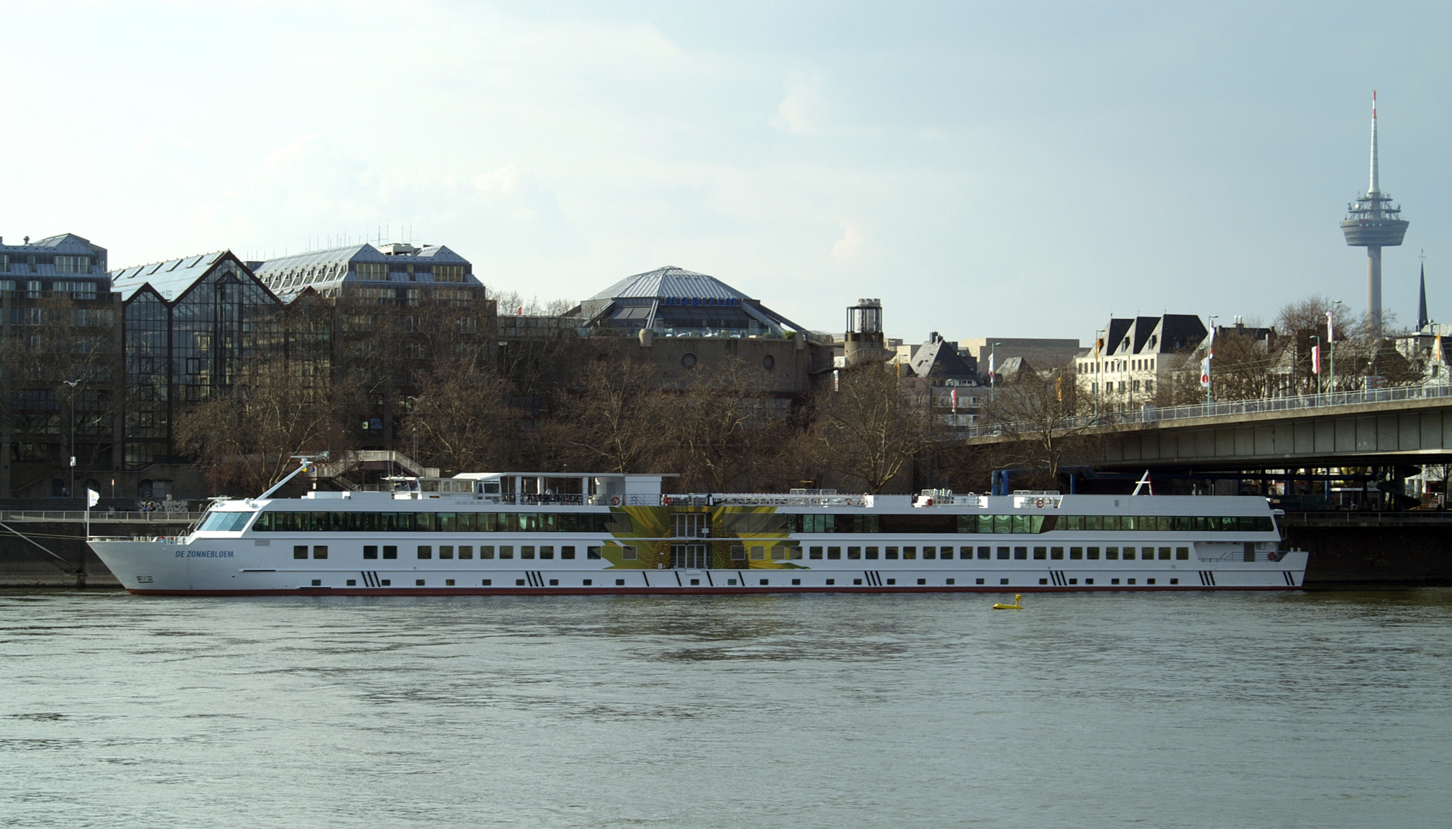 Flusskreuzfahrtschiff De Zonnebloem am Anleger Köln.